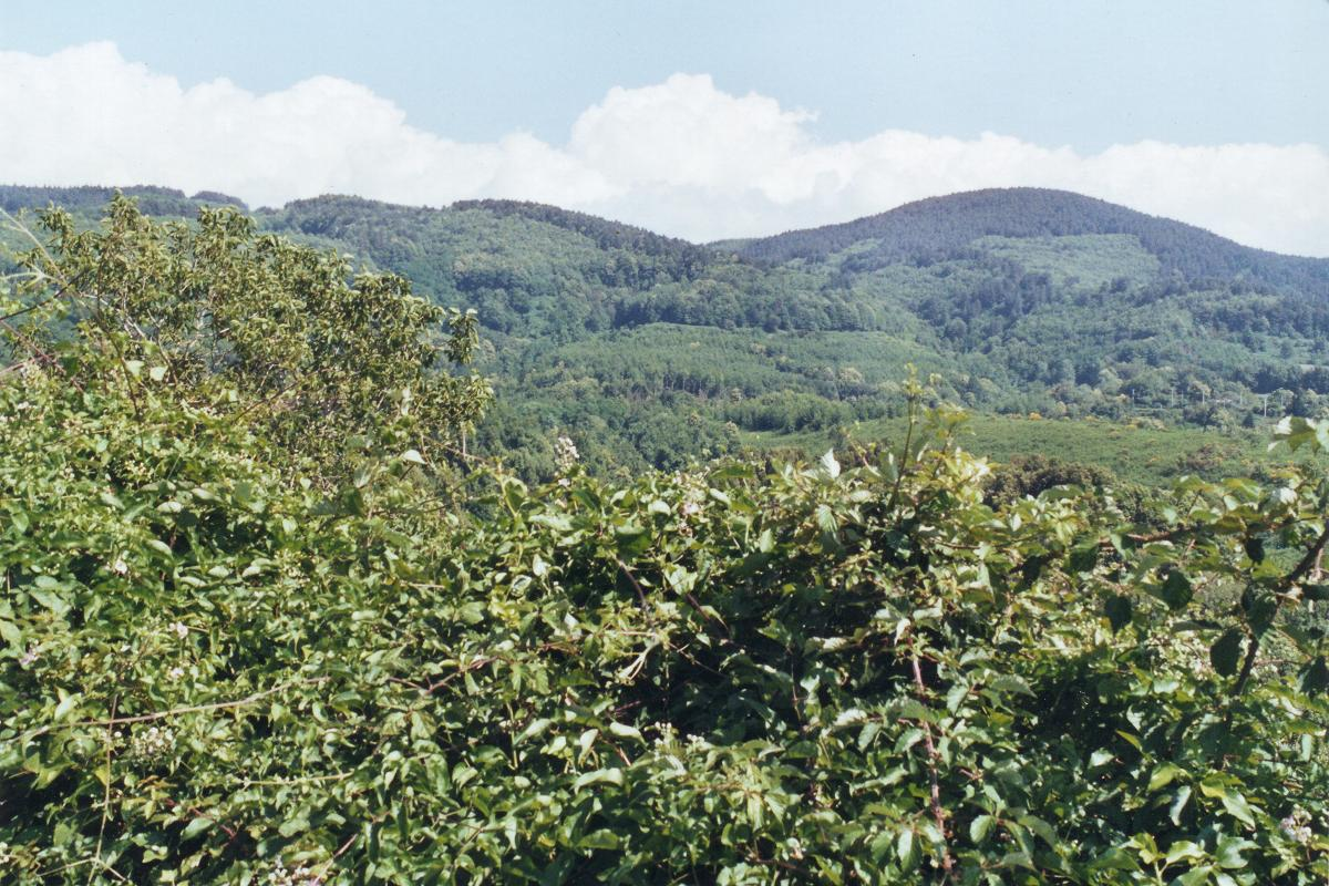 Autore della foto: Bruno Francesco Pileggi